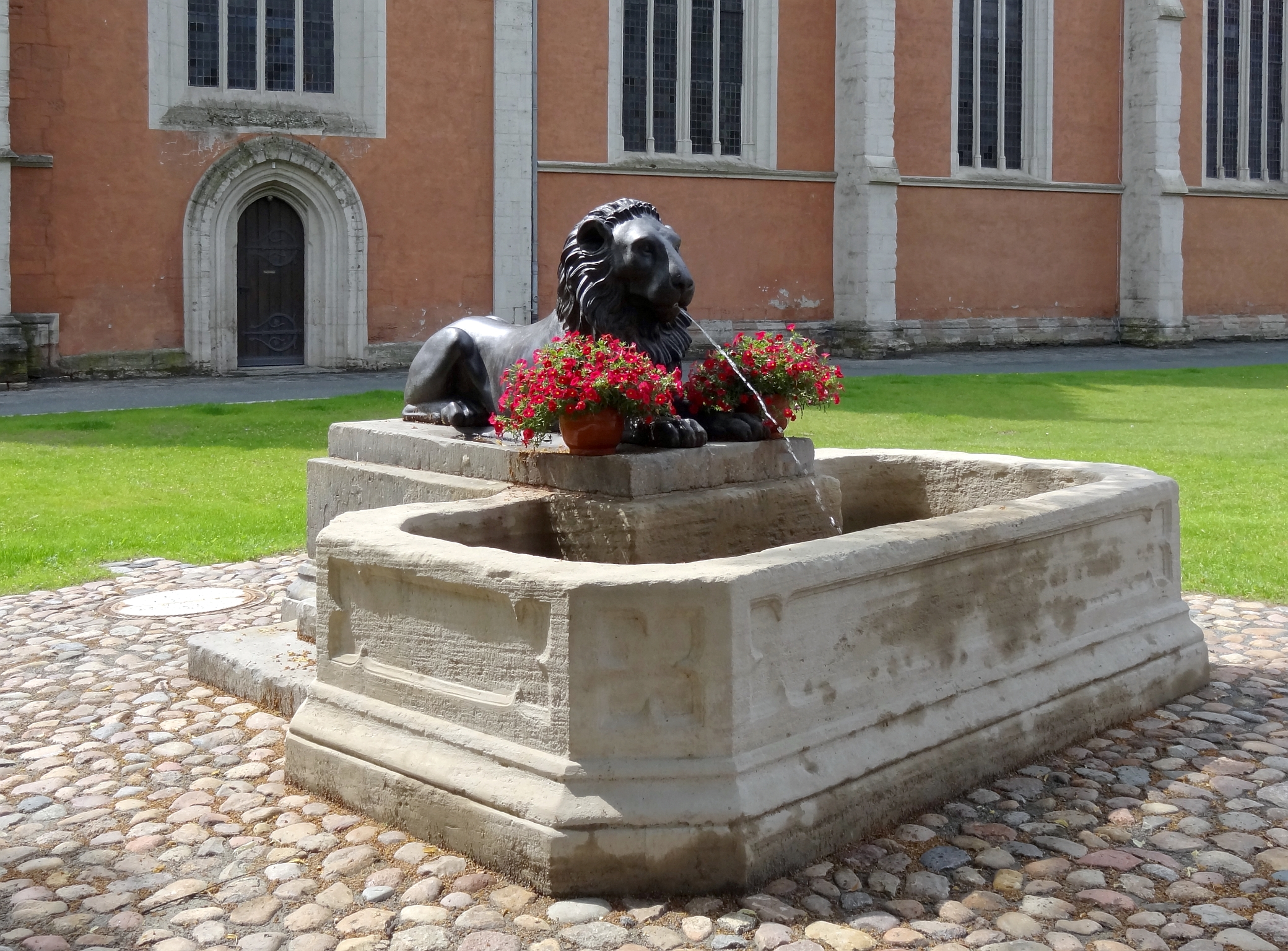 Der Löwenbrunnen wurde im Mai 2012 an seinem historischen Standort an der Nordseite der Katharinenkirche wiedererrichtet und am 17.Juni 2012 mit einem Festgottesdienst eingeweiht.